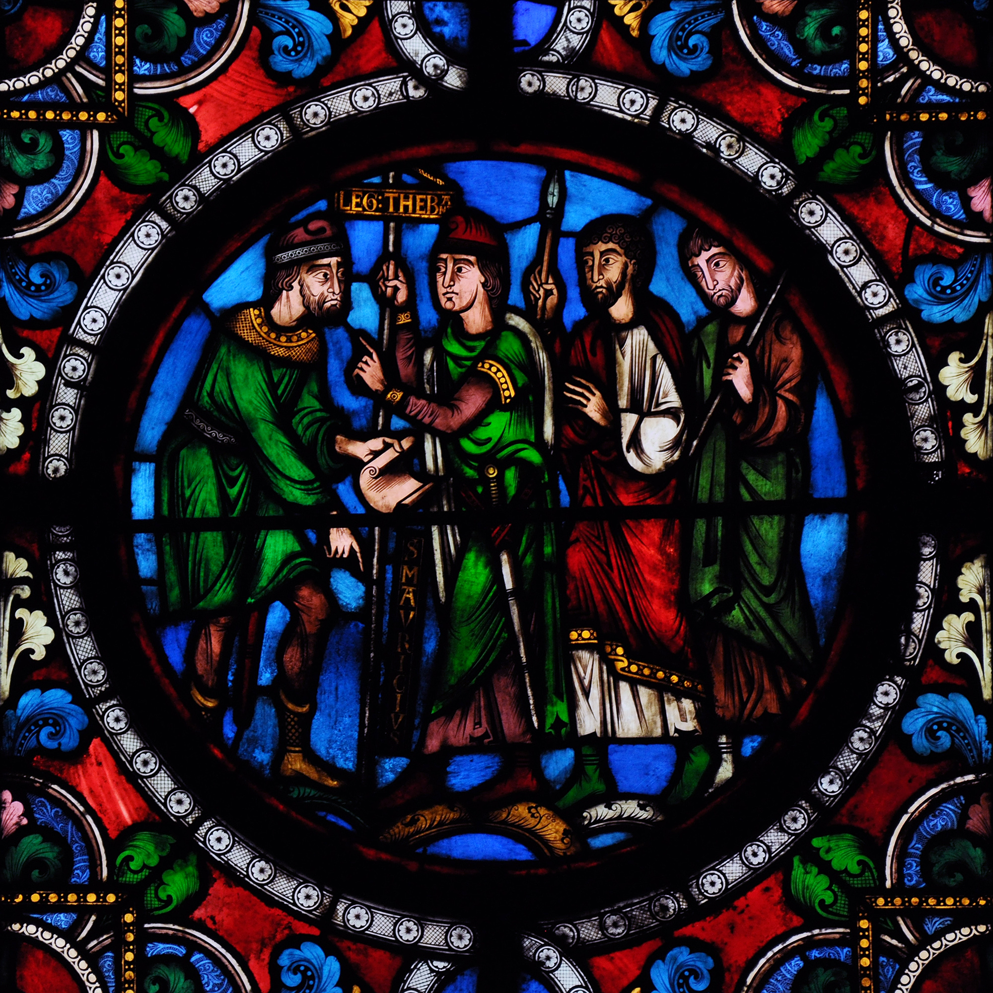 Vitrail de la Basilique Saint-Denis (chapelle Saint Maurice).Créé au 19ème siècle par Eugène Viollet-Le-Duc et Alfred Gérente: les insignes de la légion thébaine.